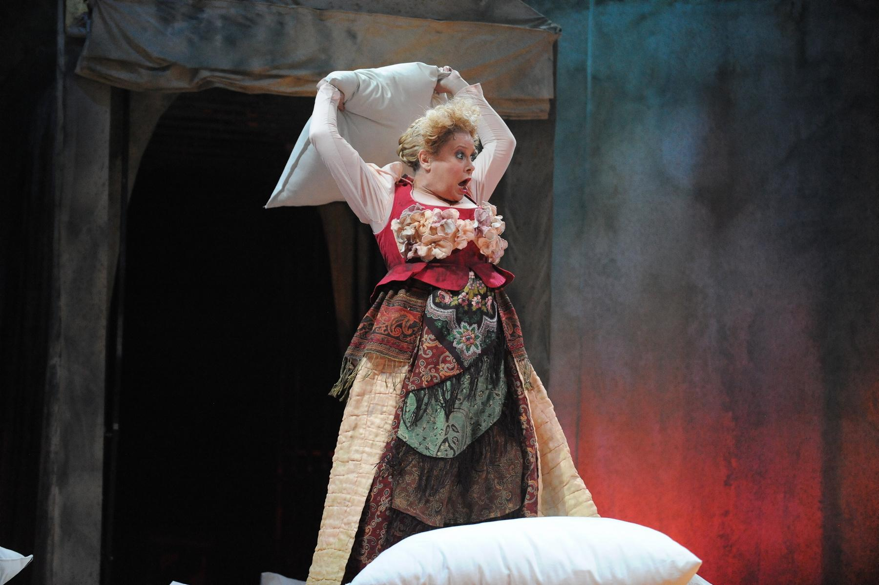 נטשה מנור אחת